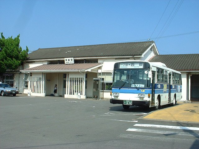 日豊本線 高鍋駅 バスは宮崎交通 2005年8月18日 Bakkai撮影